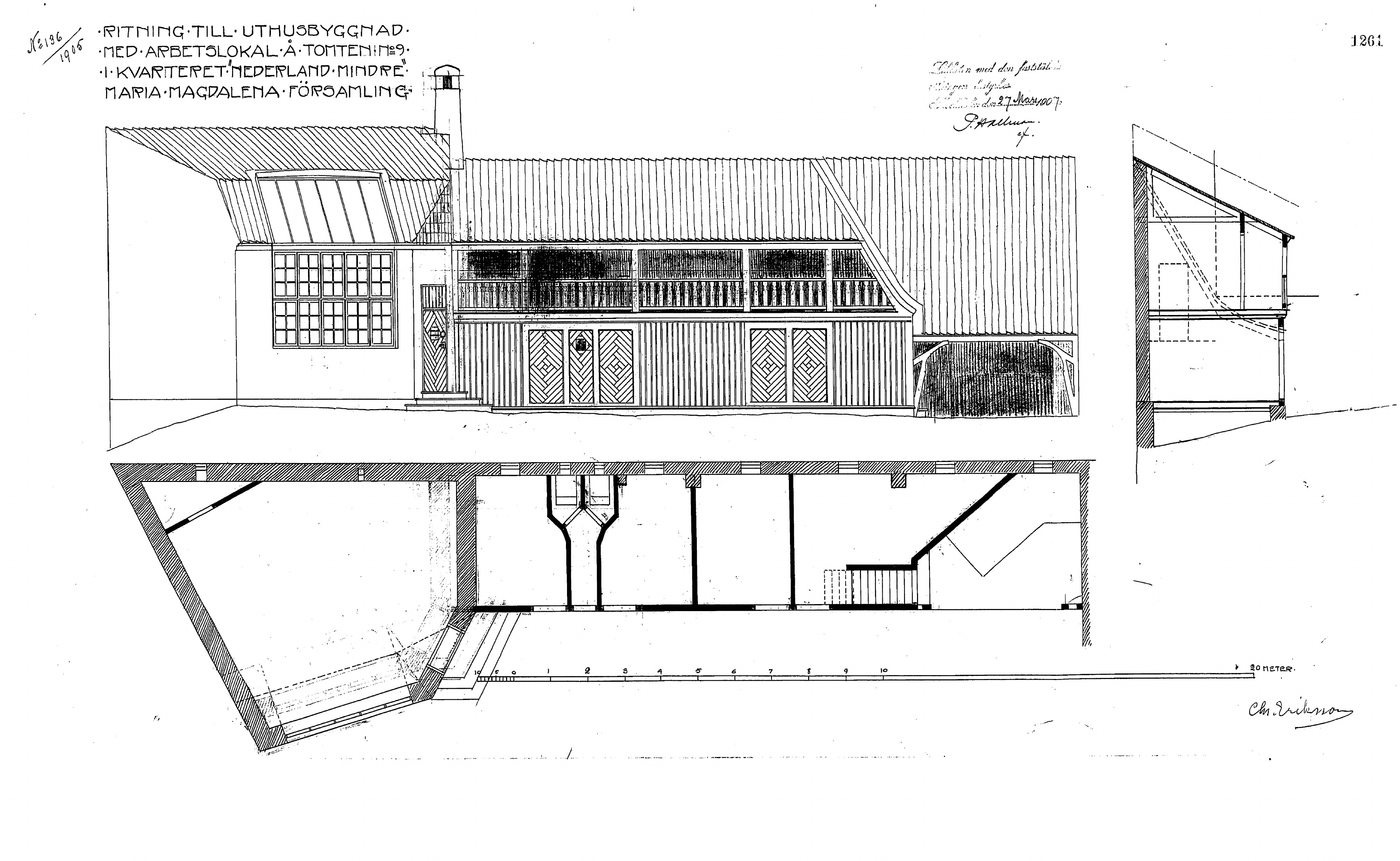 Ritning till ateljébyggnad i fastigheten Nederland mindre 9